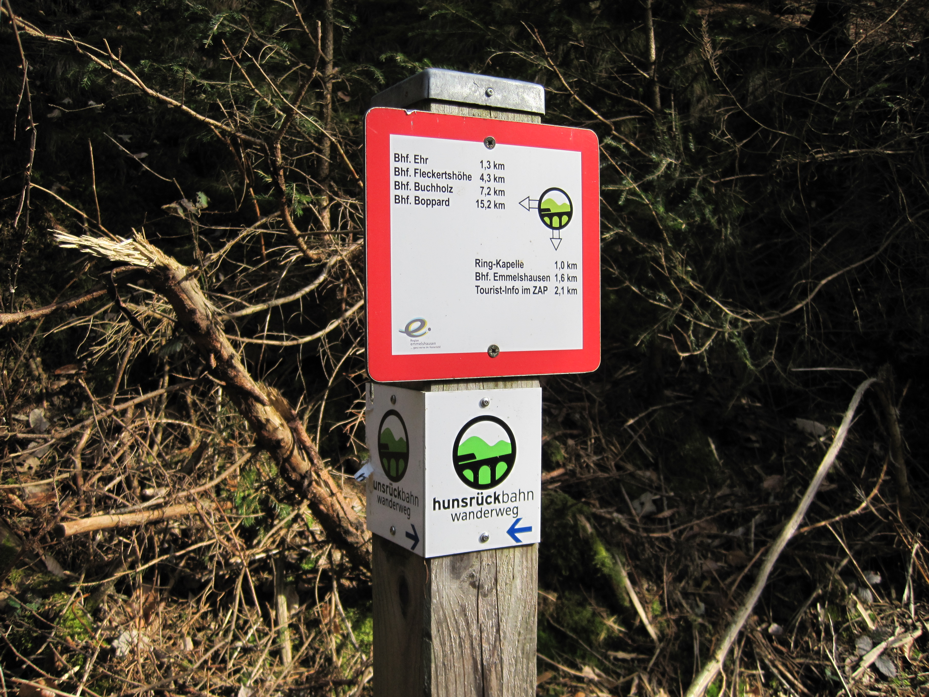 Wegmarkierung des Hunsrückbahn-Wanderweges, eines ca. 16 km langen Wanderweges entlang der Hunsrück-Bahn zwischen den Bahnhöfen Emmelshausen und Boppard Hauptbahnhof. Rhein-Hunsrück-Kreis.